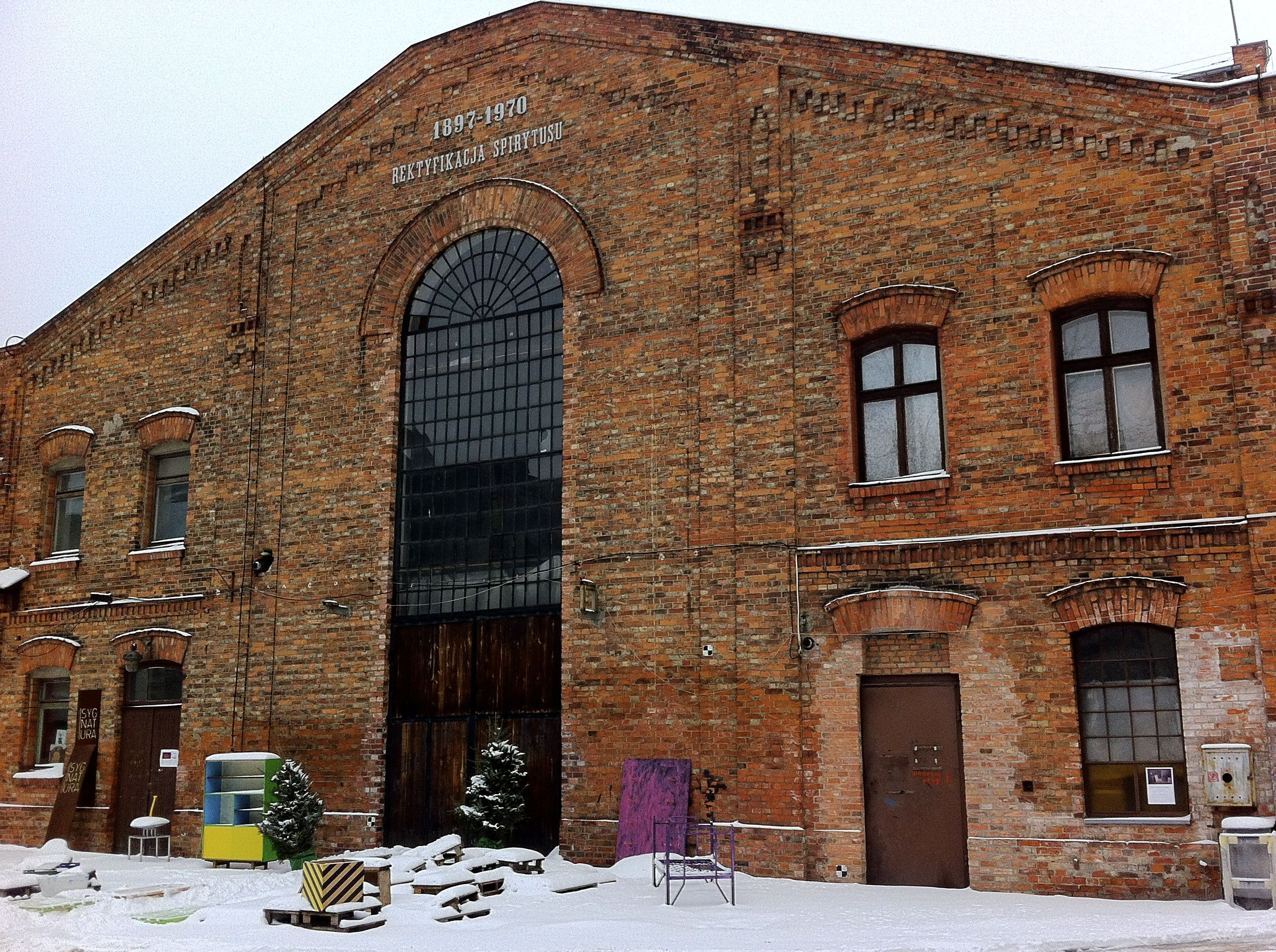 Warszawska Wytwórnia Wódek "Koneser"